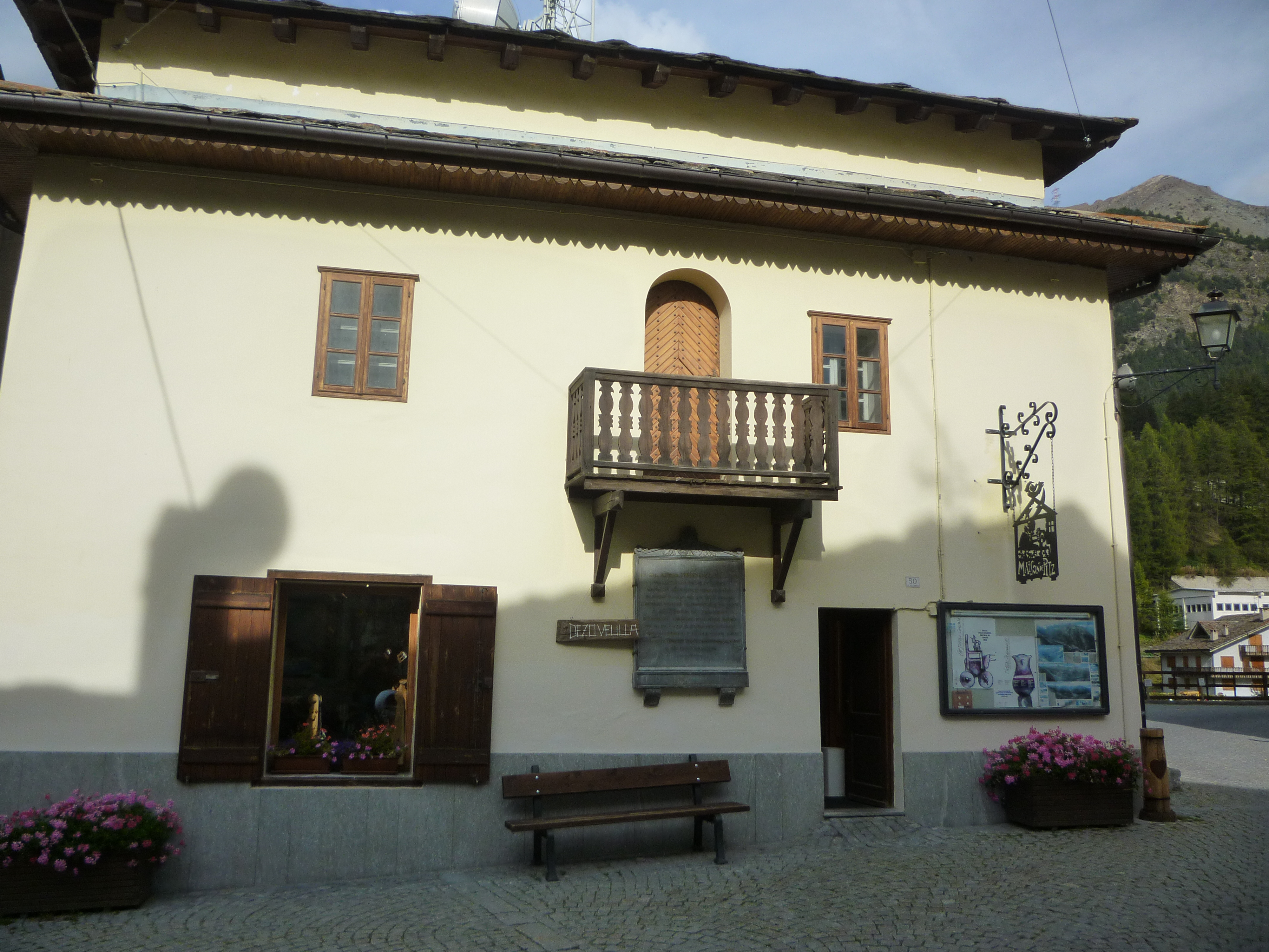 Maison des dentelles (Mèison di pitz) à Cogne (Vallée d'Aoste)